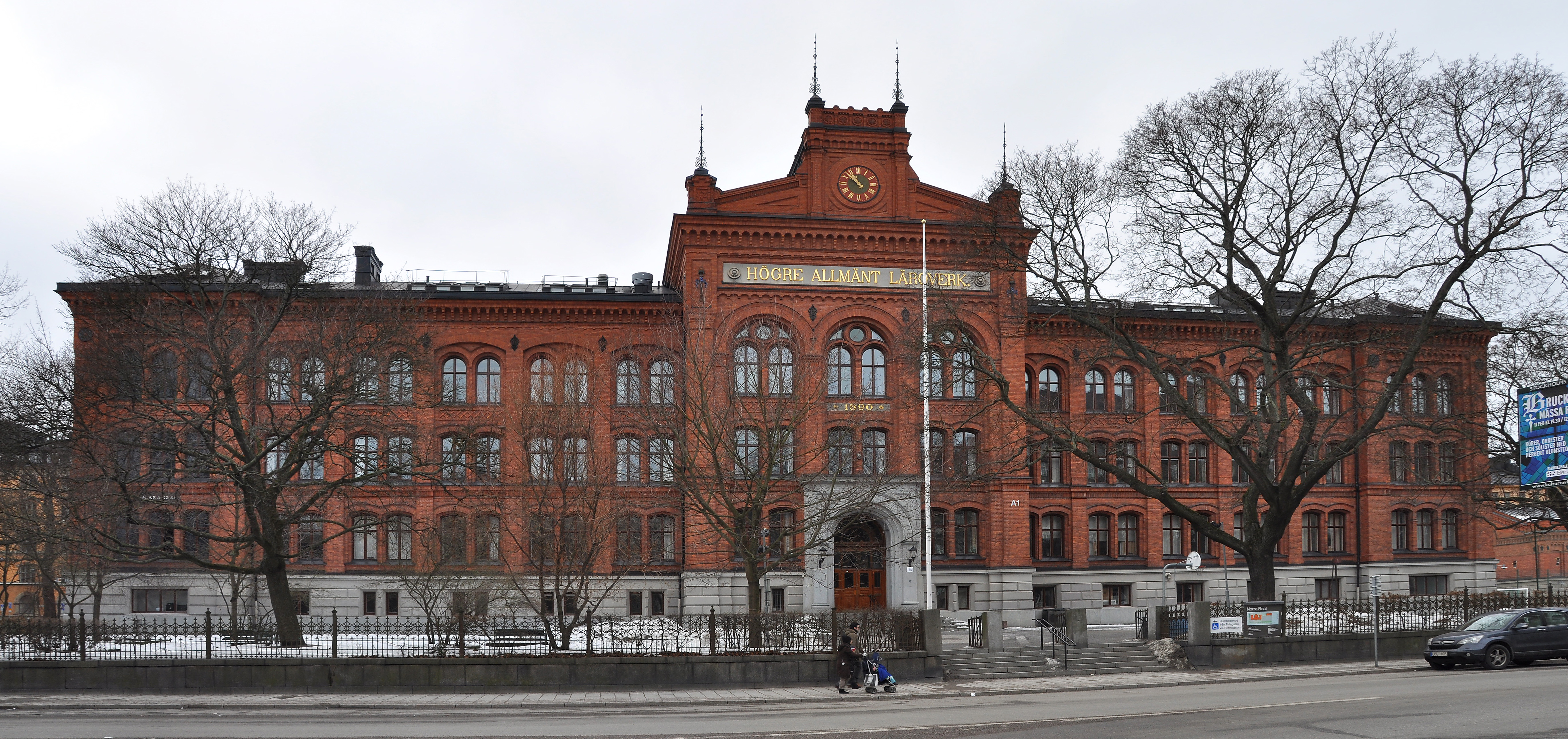 Norra Real. Roslagsgatan 1 Byggnadsår 1888-91, arkitekt Per Emanuel Werming, byggherre Skoldirektionen, byggmästare Stadens byggnadskontor .